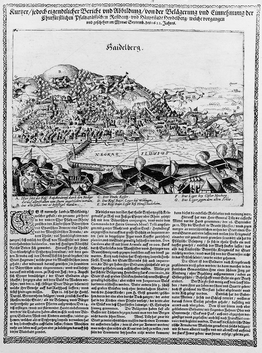 Bericht über die Belagerung und Einnahme Heildelbergs im Jahre 1622 durch Tilly